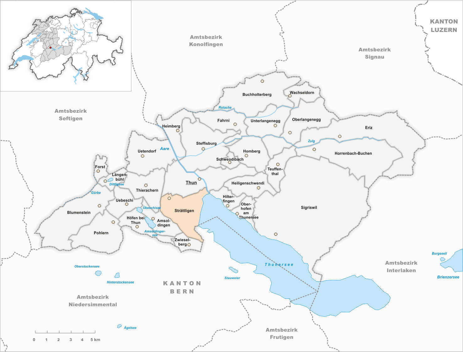 Municipality Strättligen